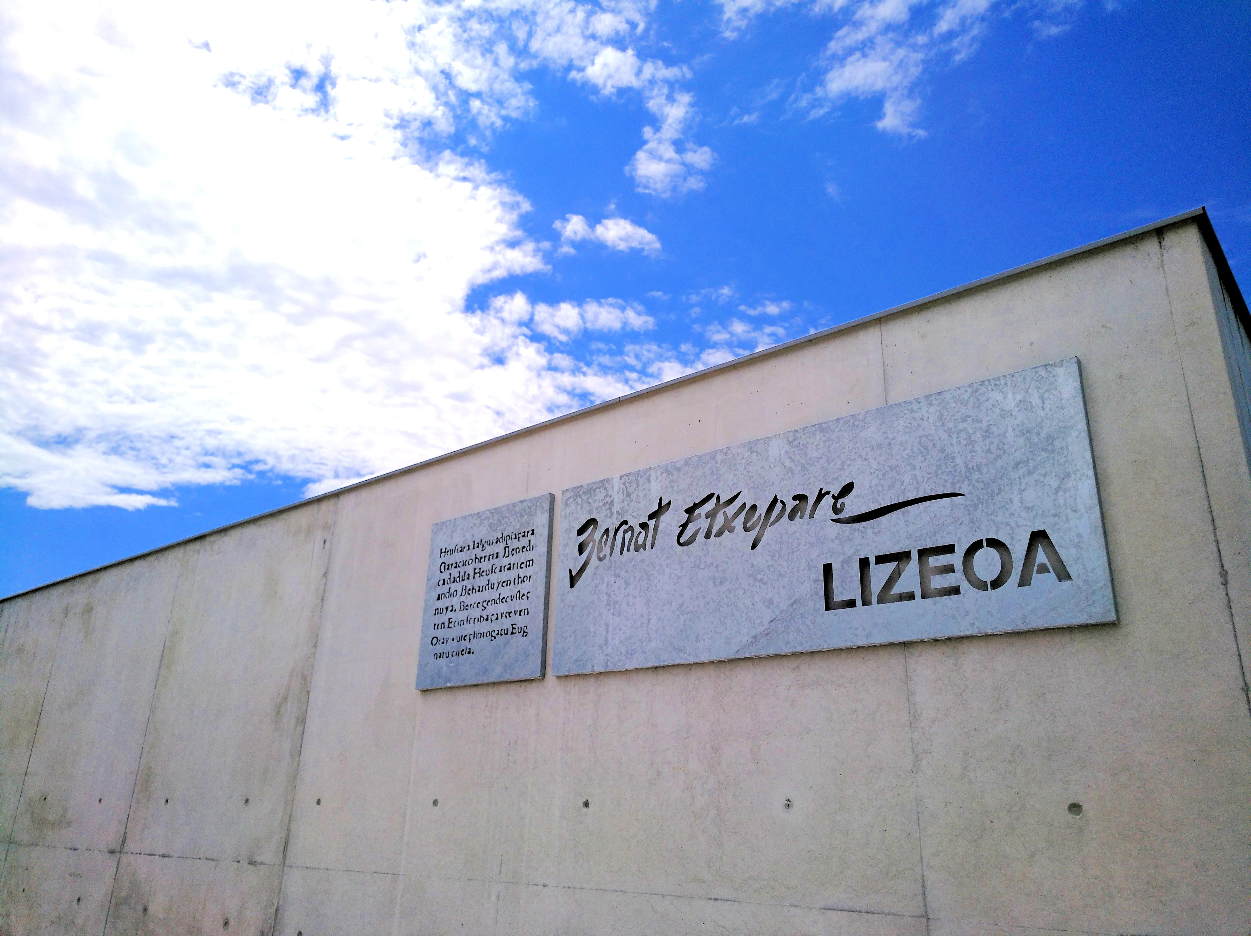 Bernat Etxepare Lizeoa Baionan